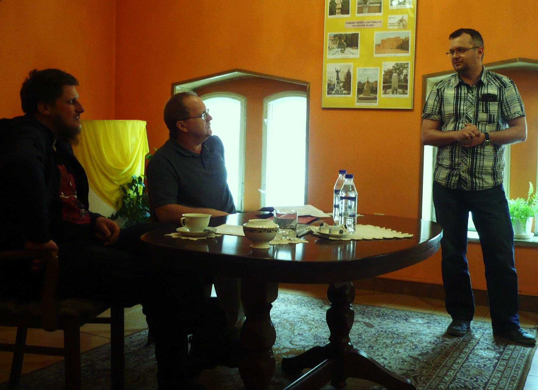 Konrad Góra